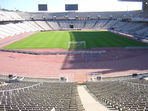 Estadio Olimpico de Montjuic